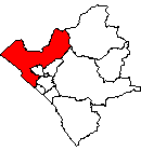 distrito de huanchaco en la provincia de trujillo